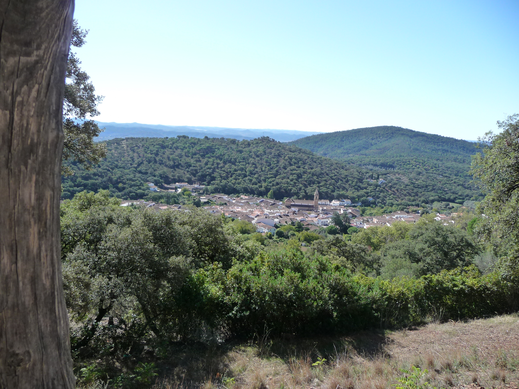 Alajar-P1040872.JPG